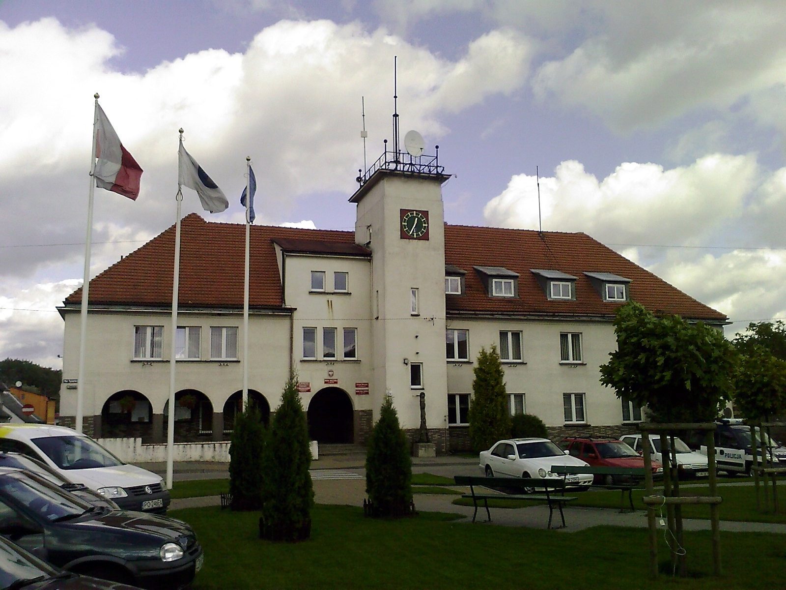 Łabiszyn - ratusz miejski